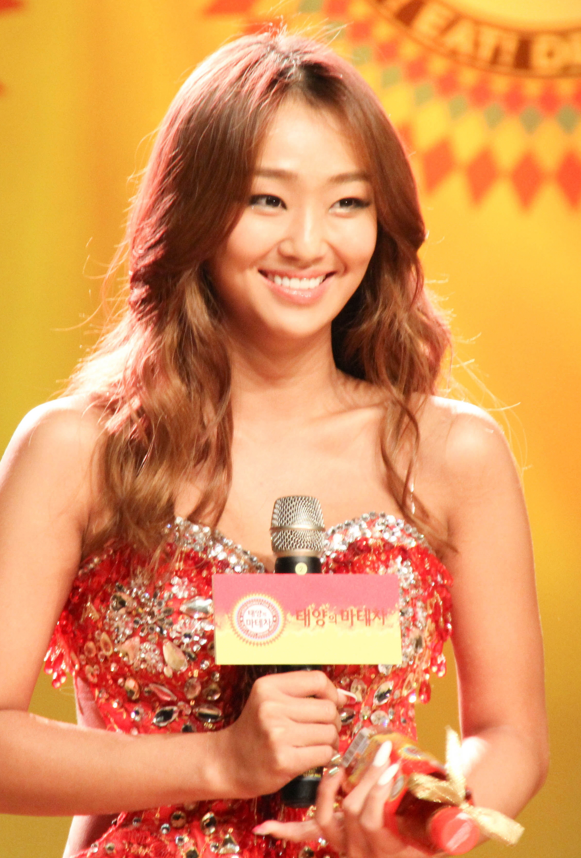 140602 효린 태양의마테차 쇼케이스